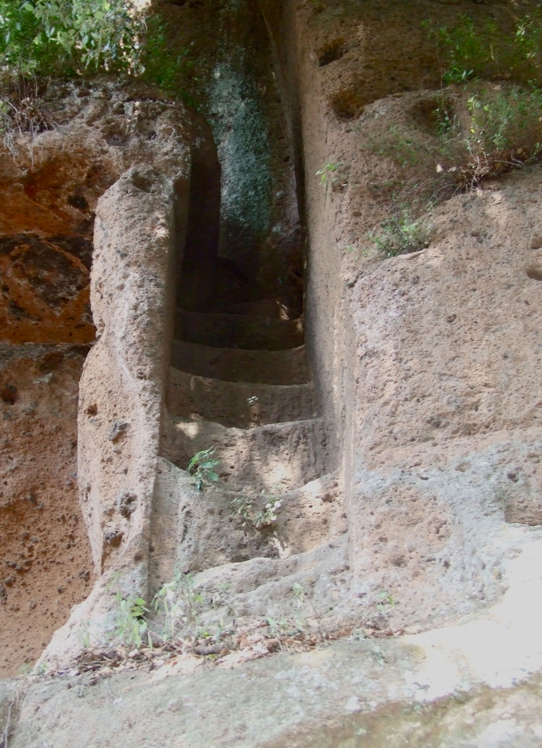 Tomba del Tifone - escalier latéral - Parco archeologico del Tufo de Sovana - Toscane